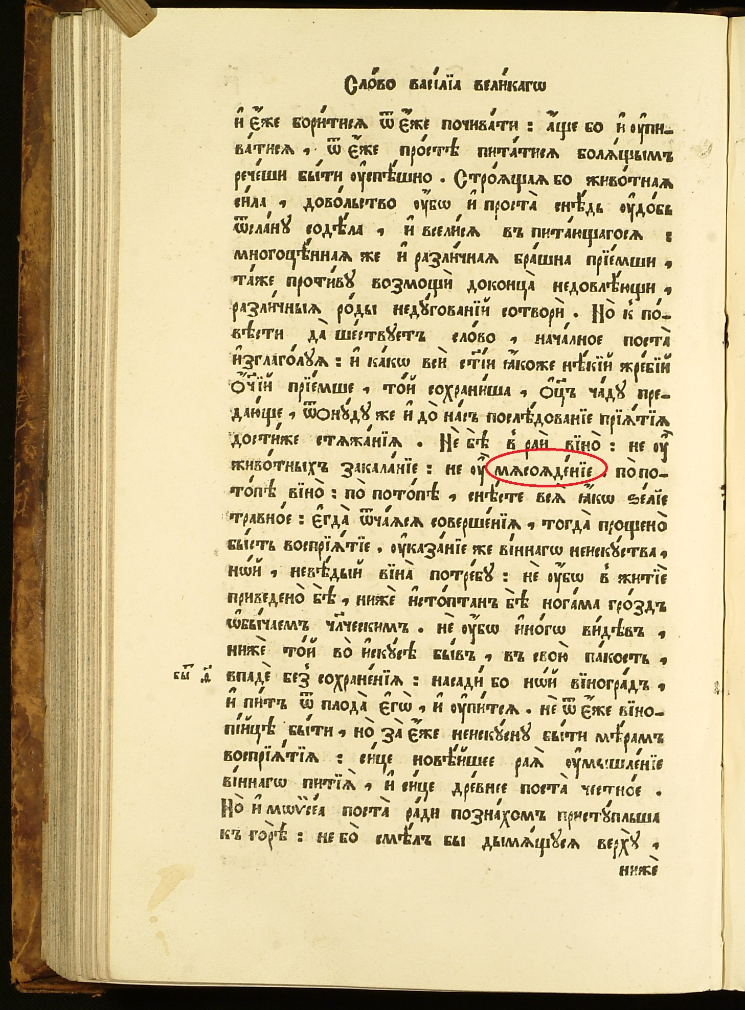 Соборник 1647 года издания. Москва. Слово Василия Великого о Посте, читаемое в пяток сырный (в пятницу сырной седмицы), в котором для наглядности выделено красным контуром упоминаемое слово «мясоядение».